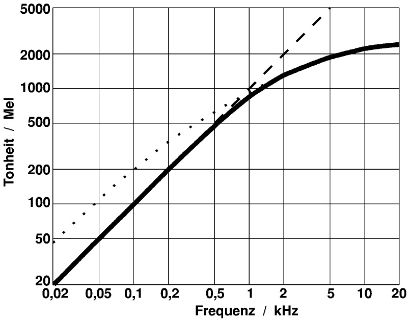 Zusammenhang zwischen Frequenz in kHz und Tonheit in mel Dargestellt werden in der Grafik der Zusammenhang zwischen der Frequenz eines Tons und der empfundenen Tonhöhe/Tonheit (durchgezogene Linie). Das Gehör wendet mehrere Methoden an, die Tonhöhe eines Tons zu bestimmen: Auswertung der Zeitstruktur der Ohrsignale, insbesondere bei tiefen Frequenzen (gestrichelte Linie) Auswertung der Position der Erregungsmaxima auf der Basilarmembran, insbesondere bei hohen Frequenzen, wenn auf Grund der Träggeit des Gehörs die Zeitstruktur nicht mehr erfassbar ist (gepunktete Linie)